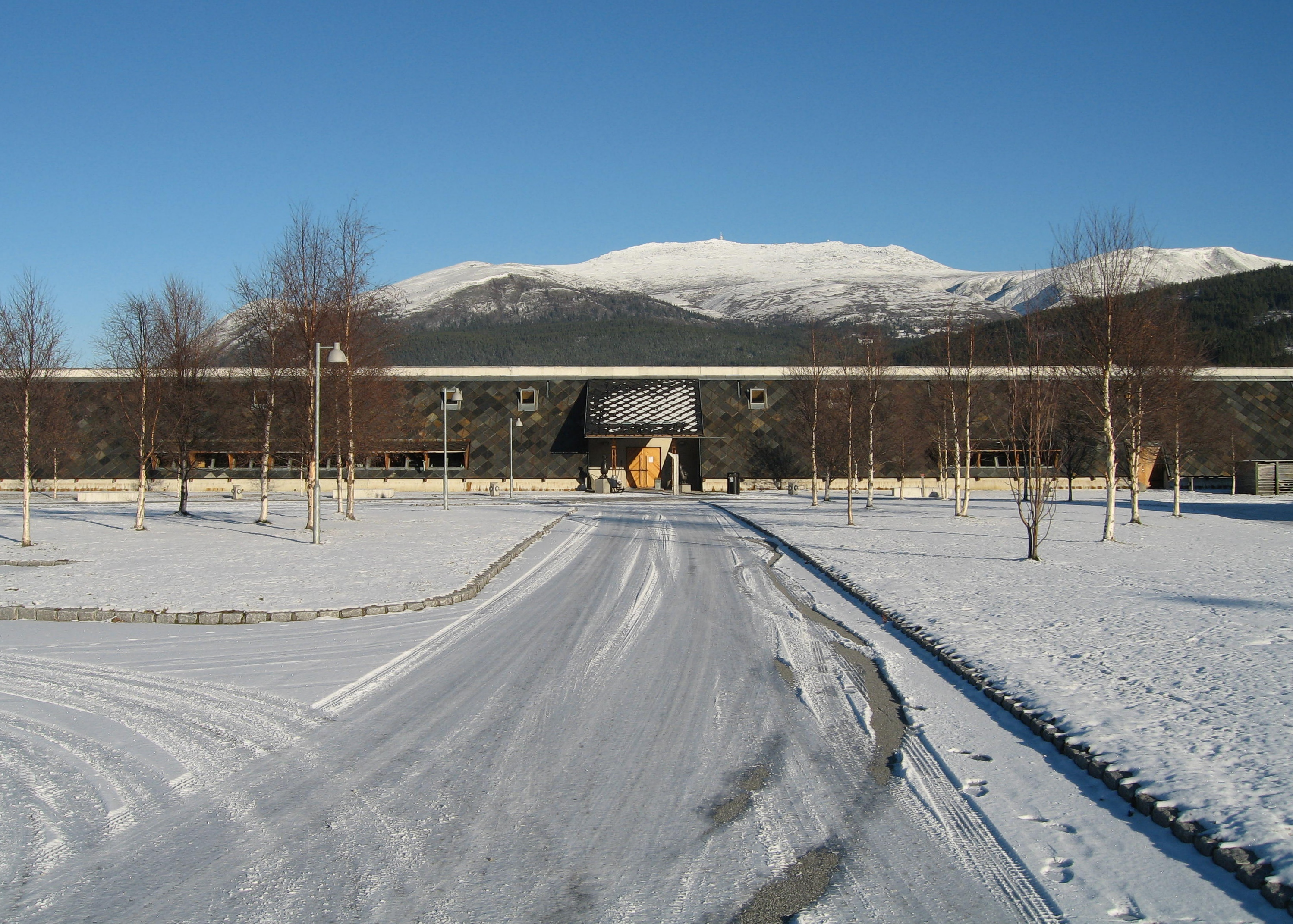 Aukrustsenteret, Alvdal